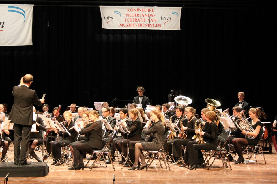 Orkest tijdens bondsconcours Zaandam 2012